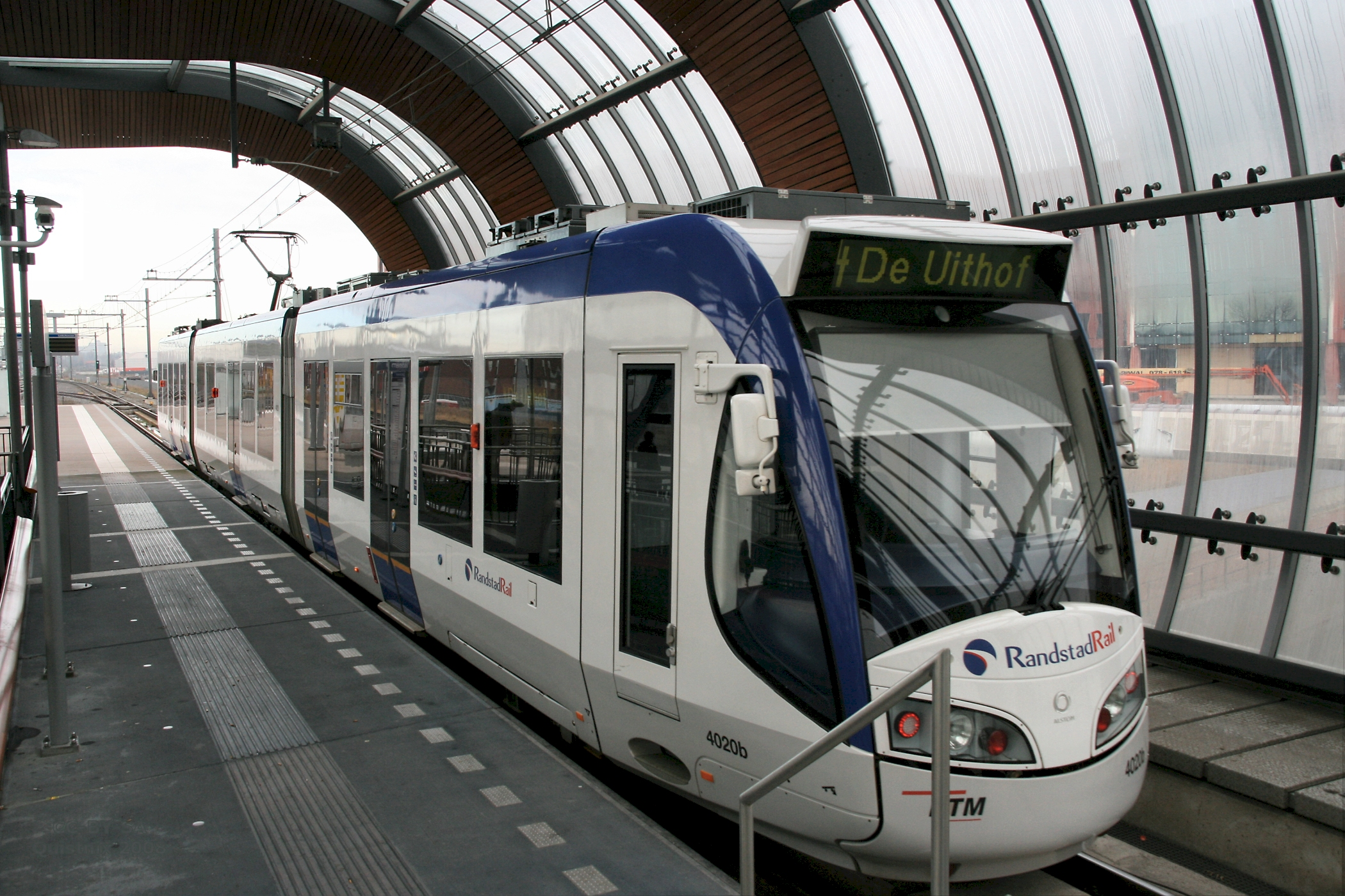 Randstadrail: station Leidschenveen met HTM-rijtuig